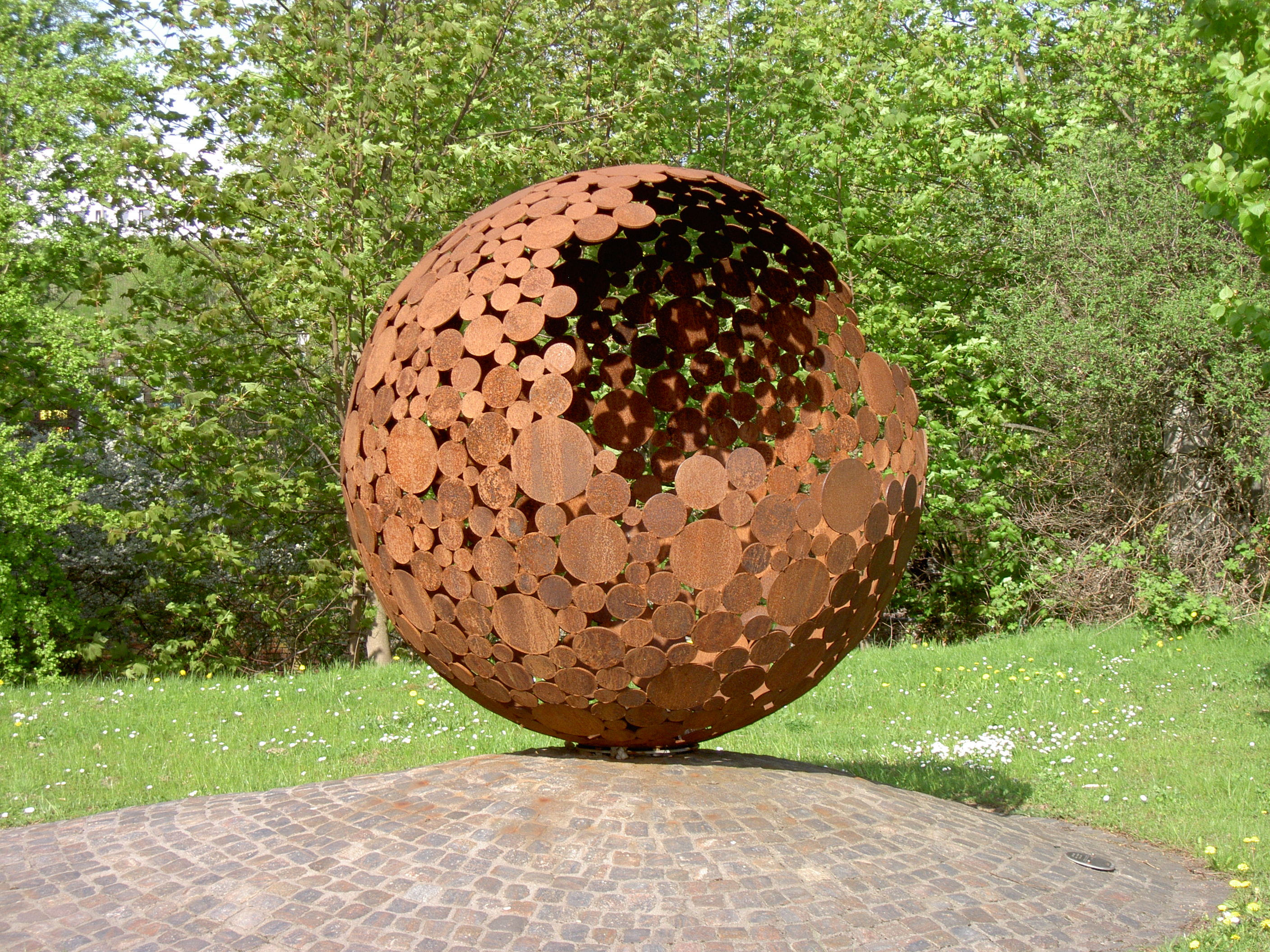 Skulptur